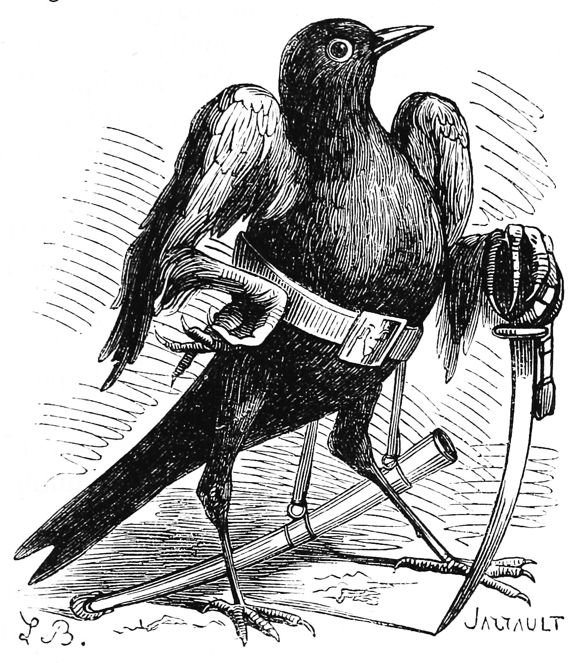 Caim. Illustration du Dictionnaire infernal de Jacques Auguste Simon Collin de Plancy par Louis Le Breton, 6eme édition, 1863.